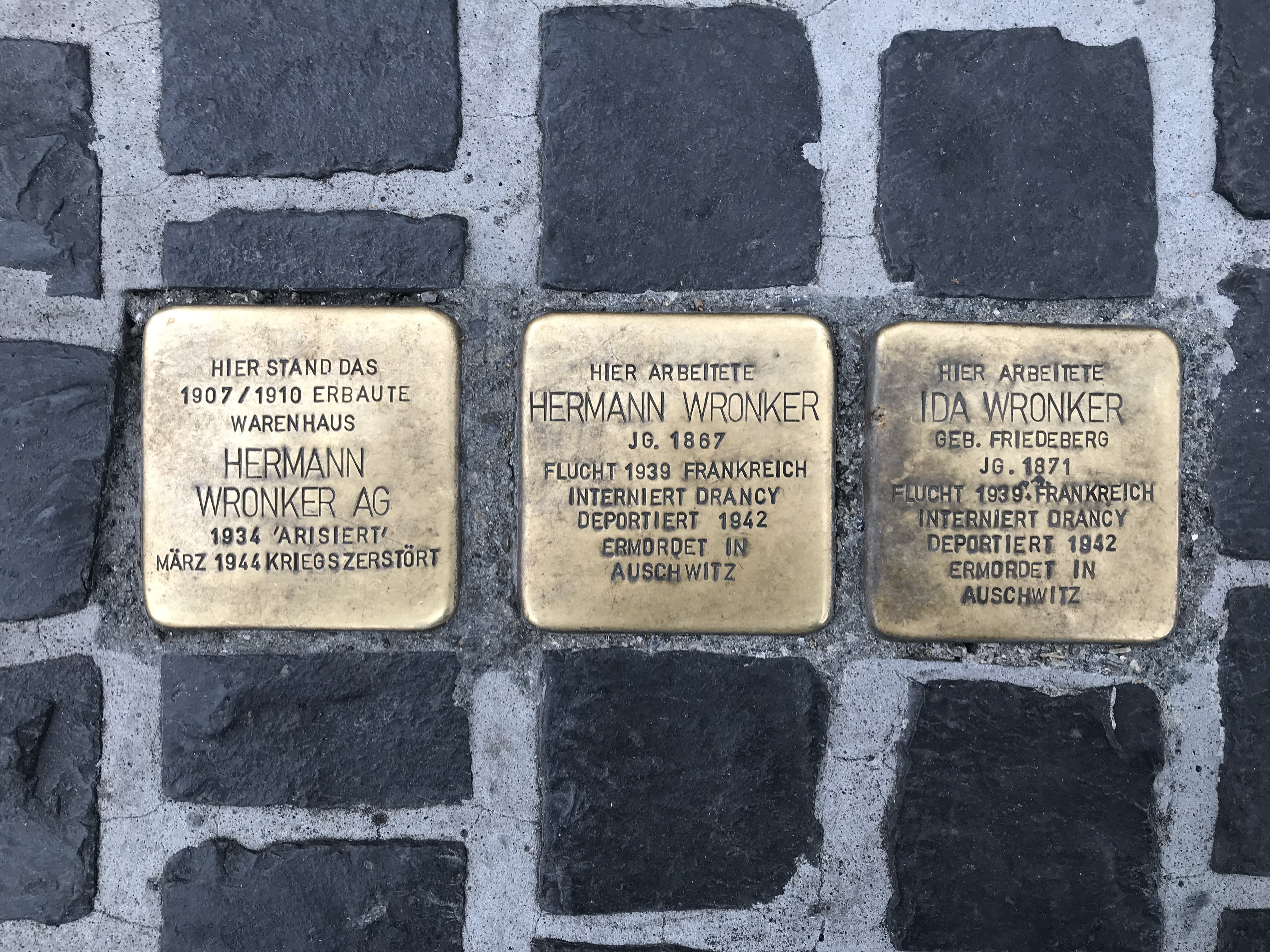 Frankfurt, Stolpersteine Wronker auf der Zeil 85-93 (101) vor dem ehemaligen Kaufhaus Wronker